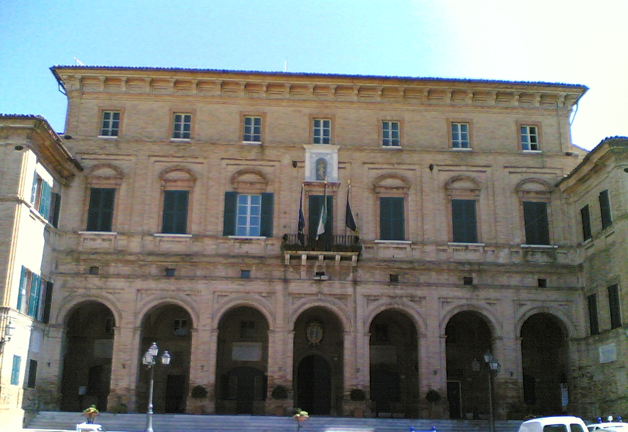 Palazzo comunale di Ostra